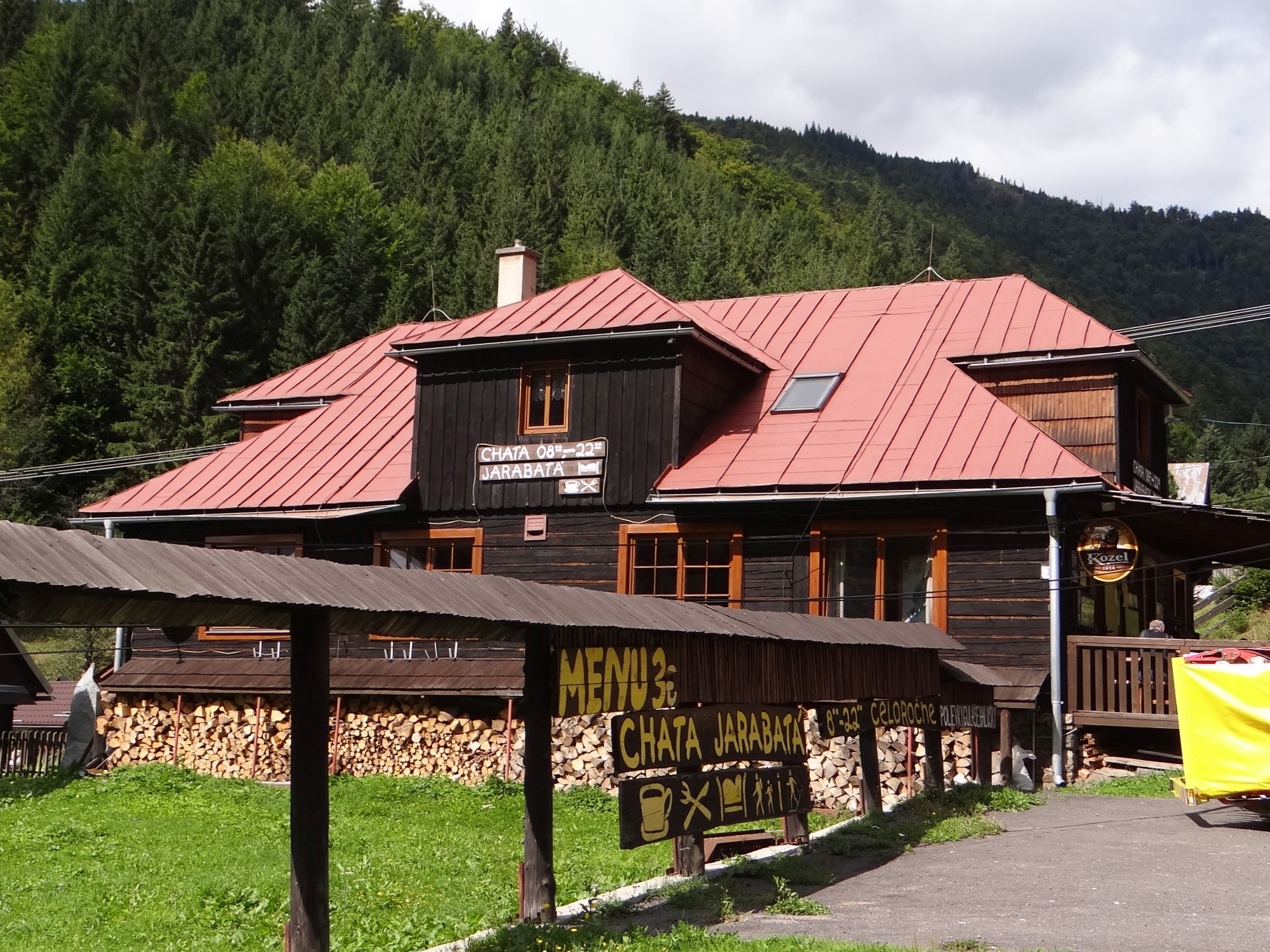 Jarabá, Brezno District